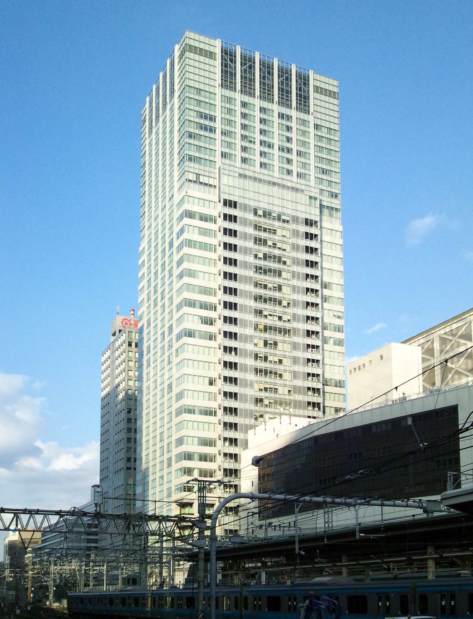 sefwdssfde